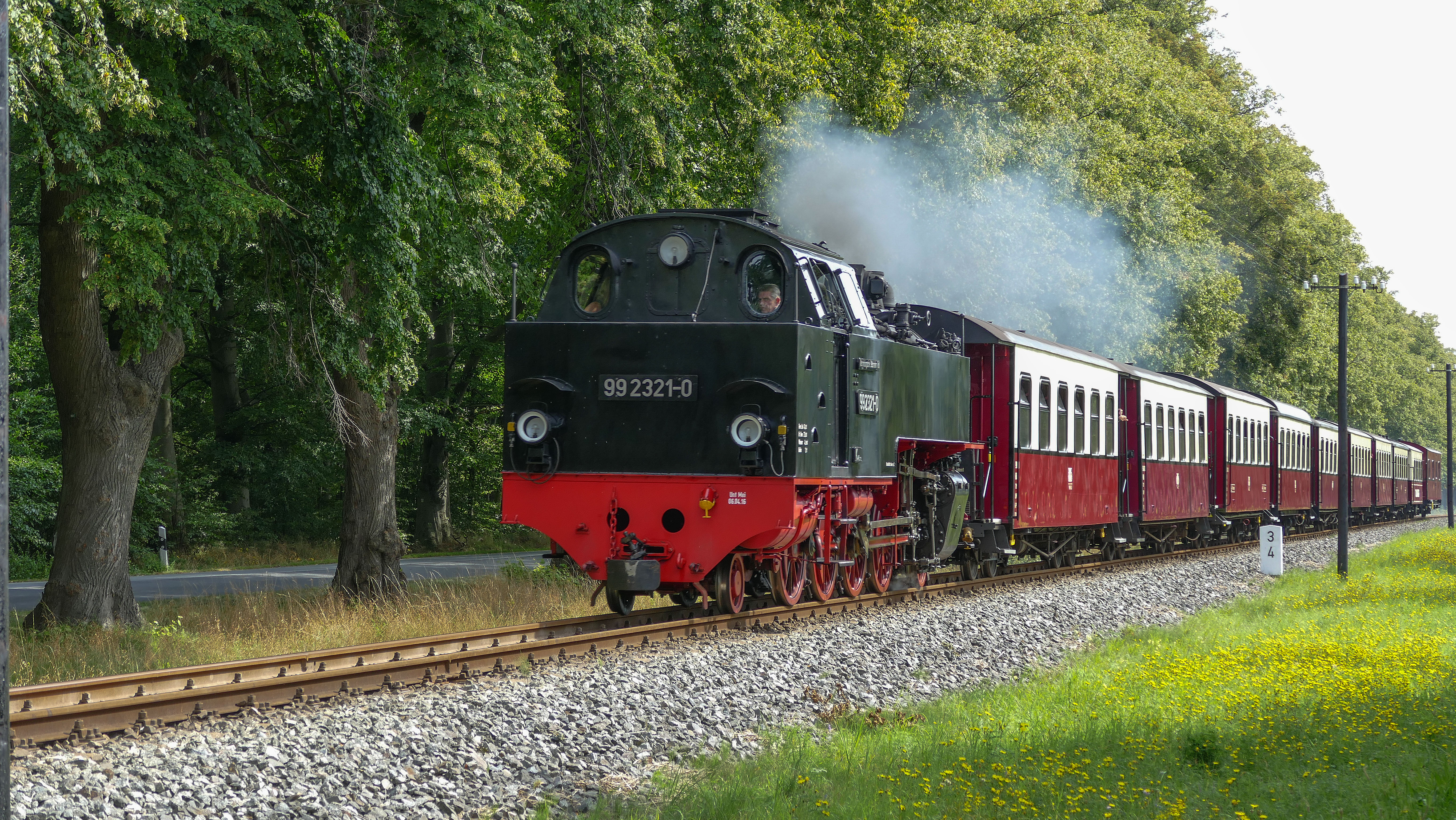 Molli auf der Strecke